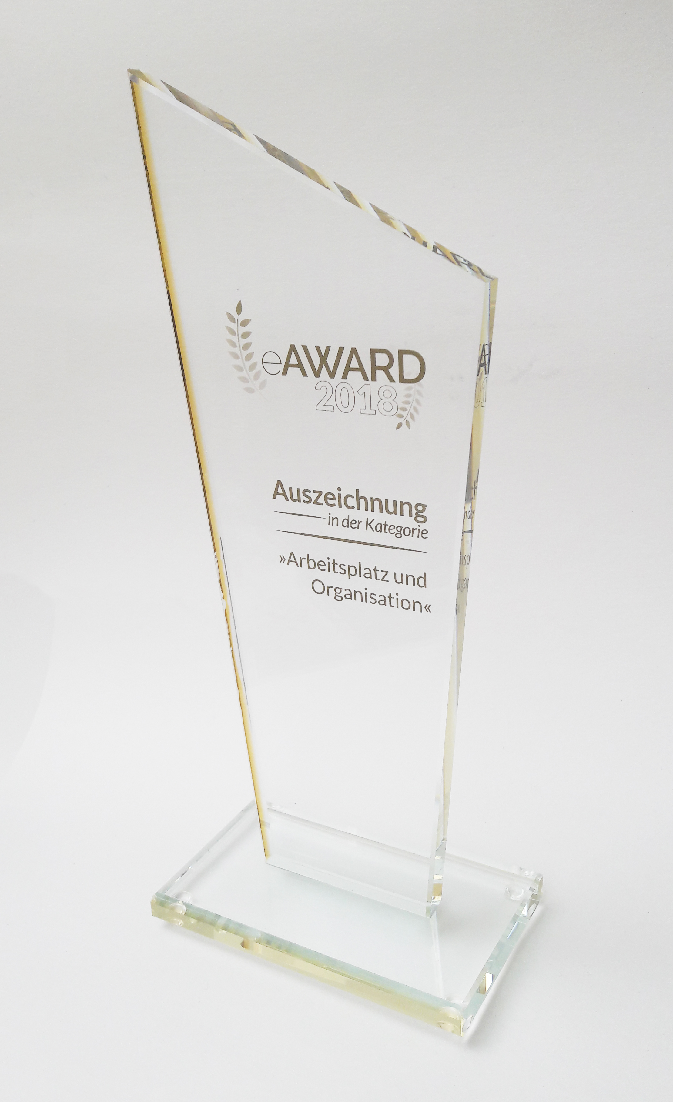 Pokal des eAwards in der Kategorie "Arbeitsplatz und Organisation"